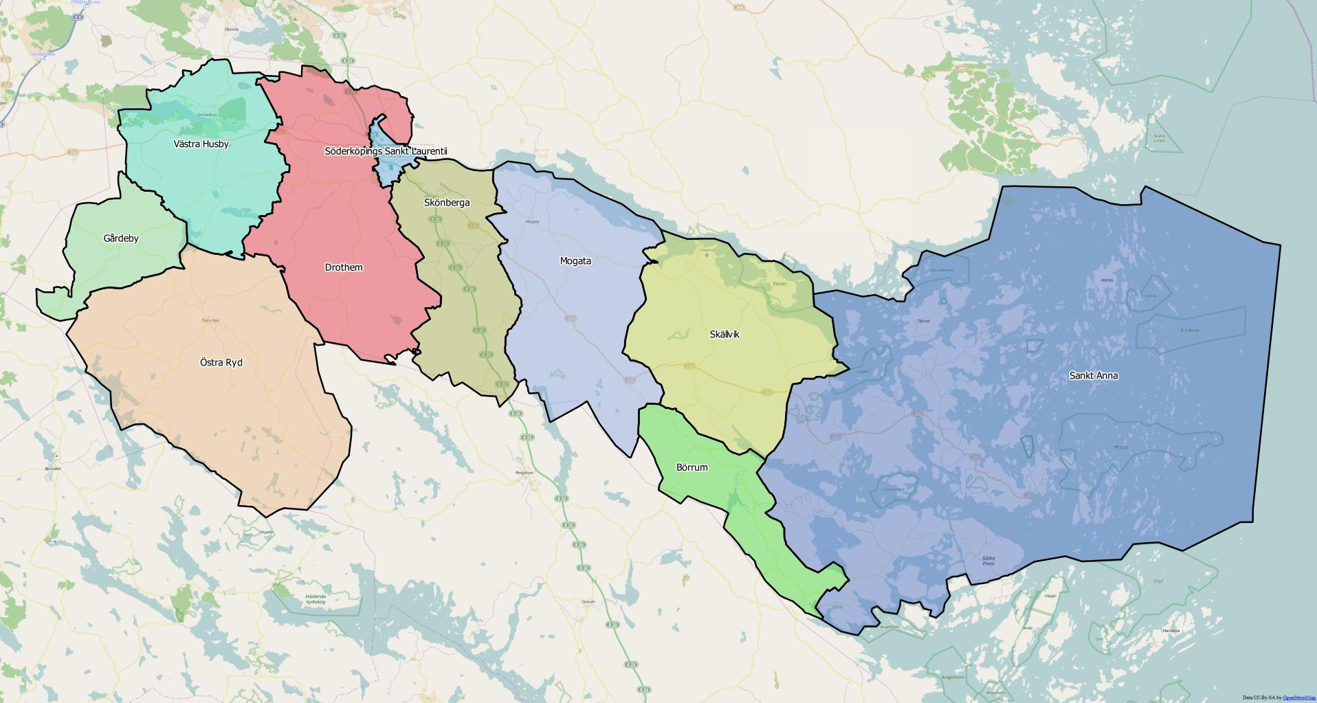 Distriktsindelningen i Söderköpings kommun World file: 68.23988748815382621 0 0 -68.23988748815382621 1778558.71785336220636964 8084627.11284720897674561